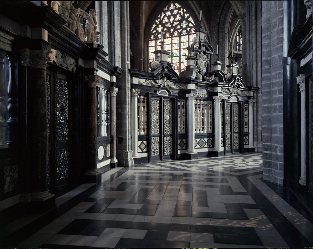 kapellen XVI en XV; inv nr: 92 en 93